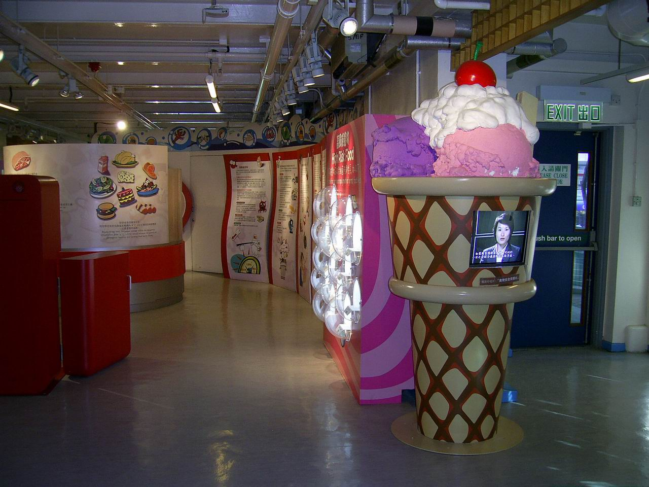 中文（香港）: 衛生教育展覽及資料中心高風險食物展覽